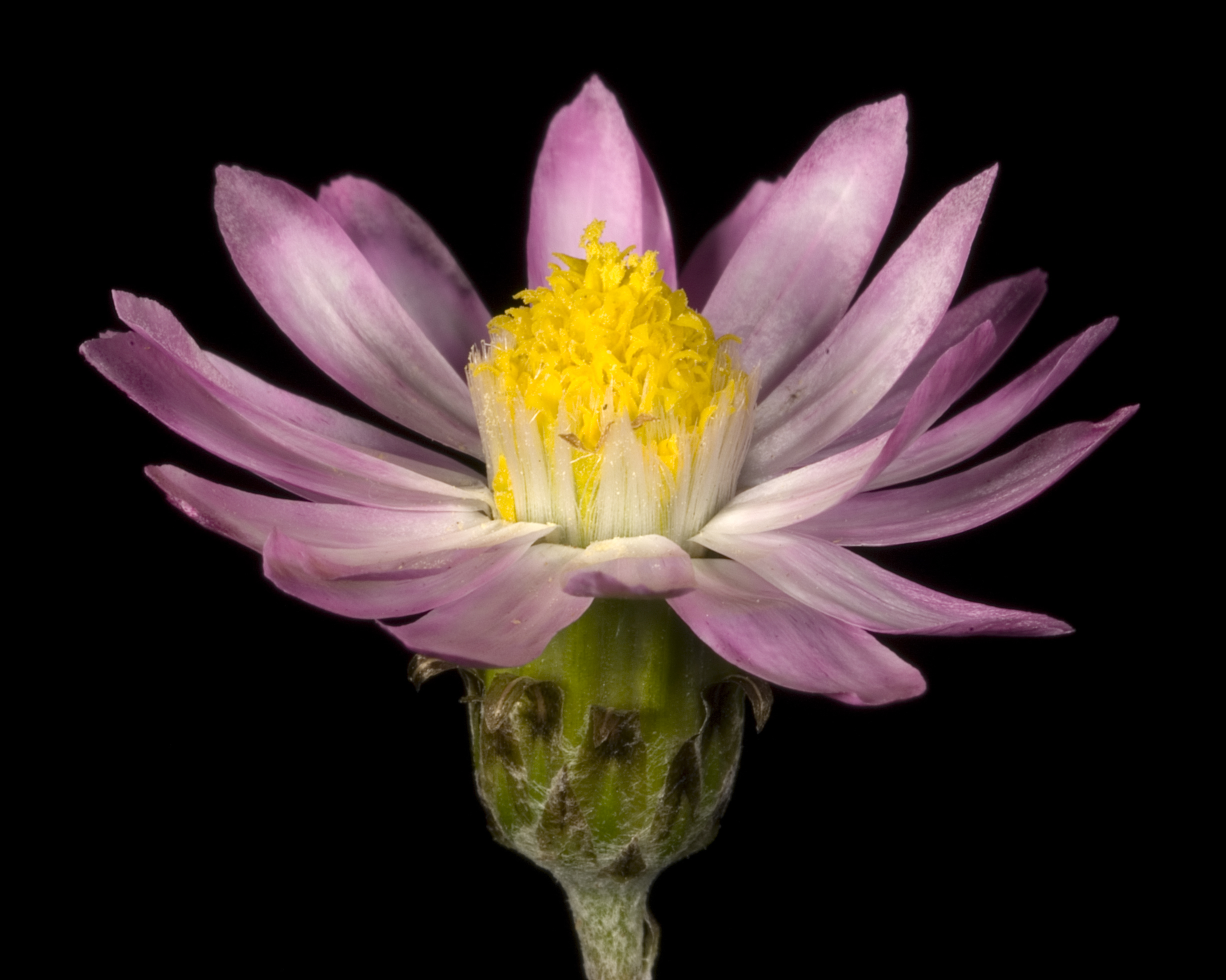 KRT3382